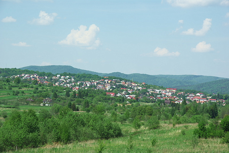 Okołowiczówka Sanok